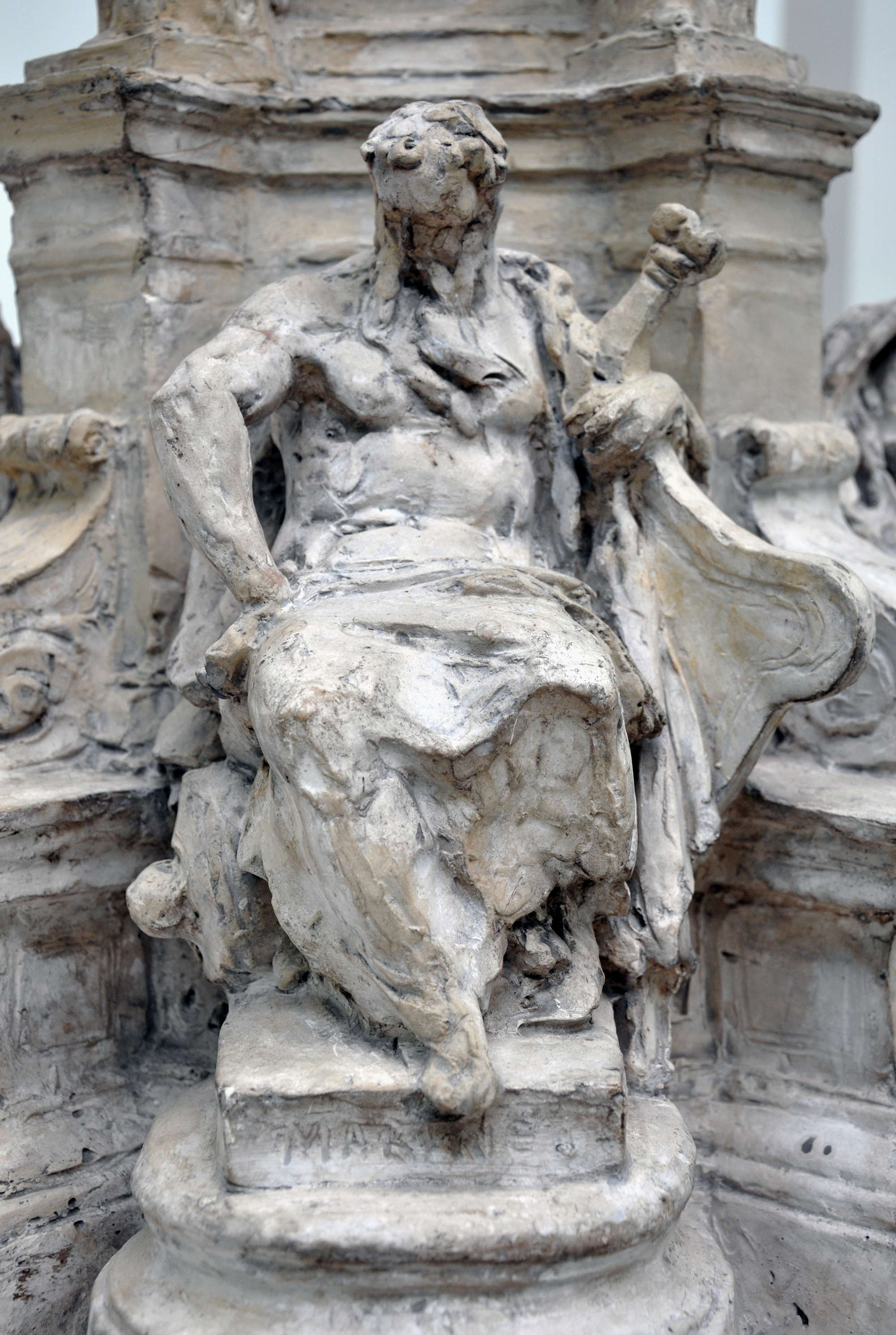 Antoine Watteau, maquette pour la fontaine offerte par Jean-Baptiste Carpeaux (Valenciennes 1827-Courbevoie 1875) à sa ville natale,détail. Plâtre, 1863-1864. Musée des Beaux-Arts de Valenciennes.